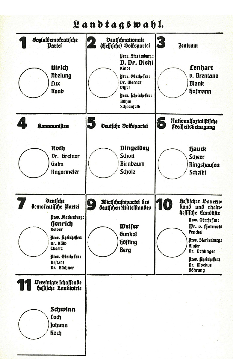 Stimmzettel zur Landtagswahl im Volksstaat Hessen 1924